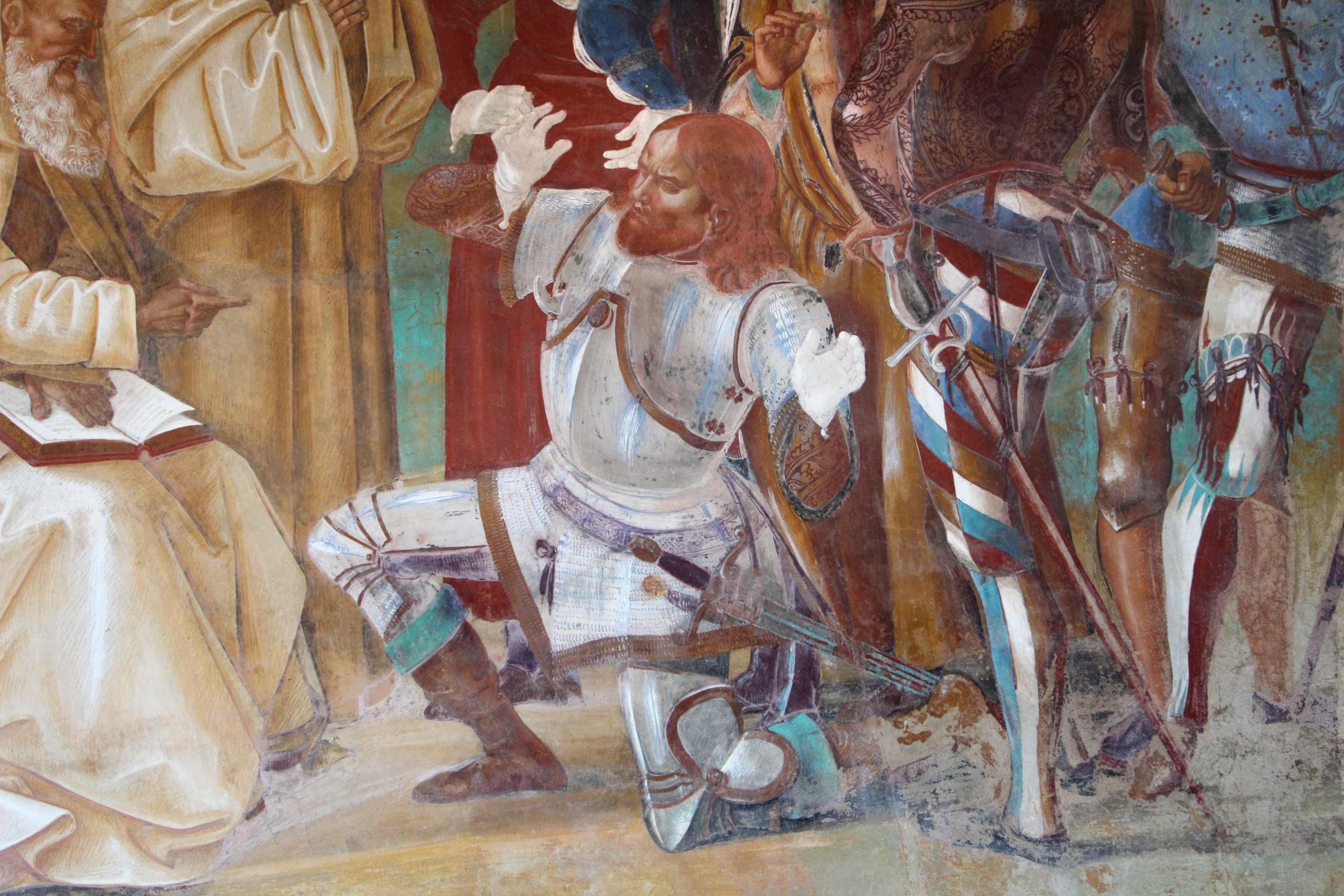 Abbazia di Monte Oliveto Maggiore